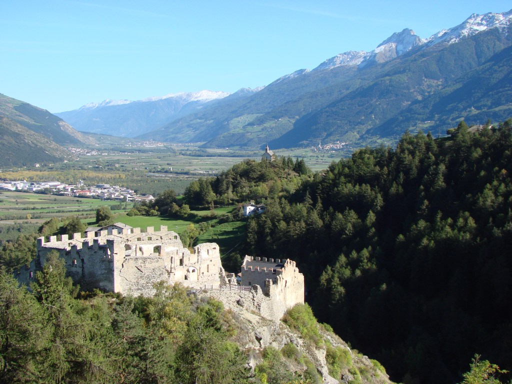 Burgruine Lichtenberg and Kirchlein St. Christina